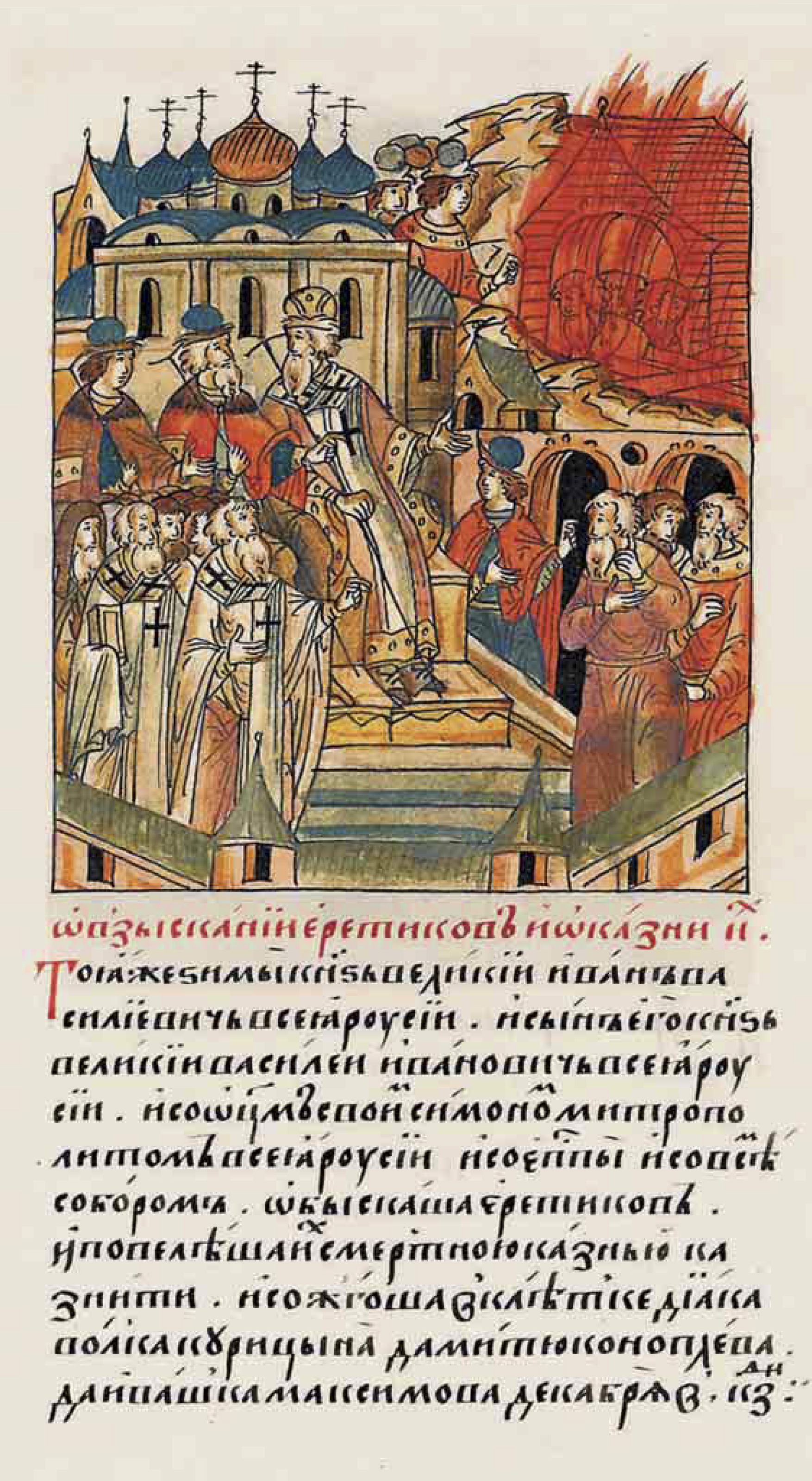 О расследовании дел еретиков и об их каз- ни. В ту же зиму великий князь всея Руси Иван Васильевич и его сын великий князь всея Руси Василий Ивано- вич со своим отцом Симоном, митрополи- том всея Руси, с епи- скопами, и со всем собором расследовали дела еретиков и по- велели их предать смертной казни. И со- жгли в клетке дьяка Ивана Волка Курицы- на и Митю Коноплева, и Ивашку Максимова в декабре в 27 день